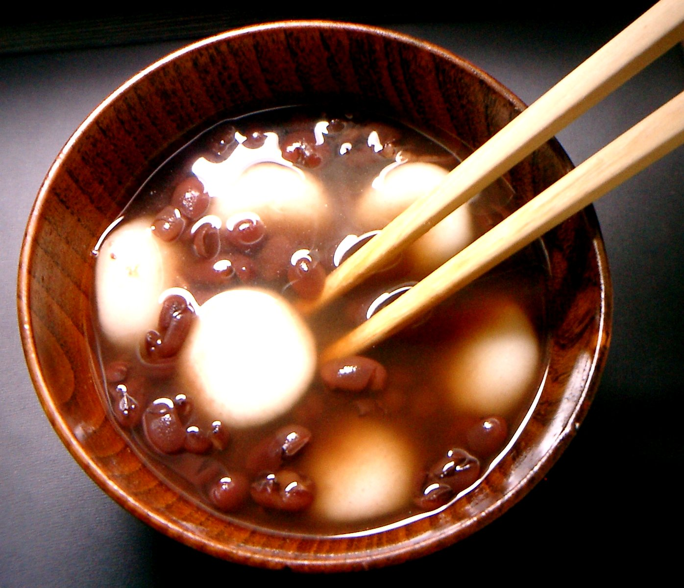 Shiruko(Zenzai) - Traditional Japanese dessert